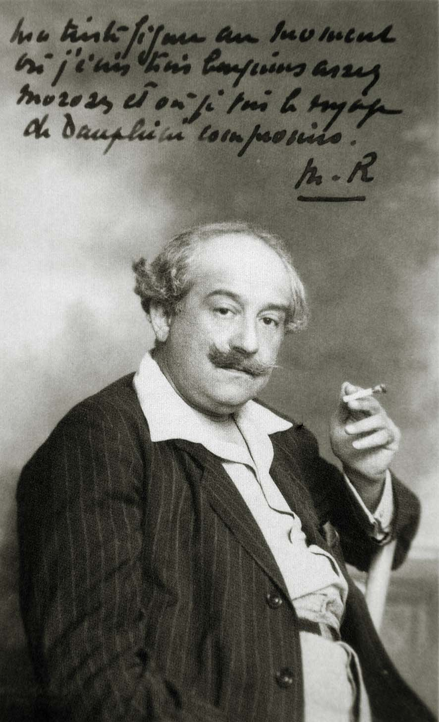 archives Curnonsjy éditée par Jeanne B Barondeau 2007